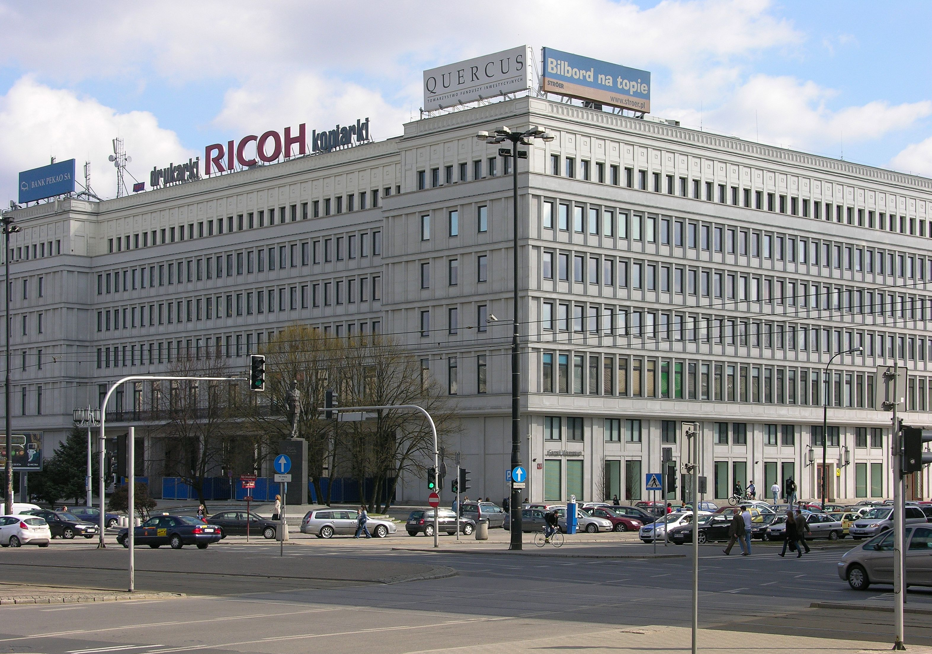 Centrum Bankowo-Finansowe w Warszawie